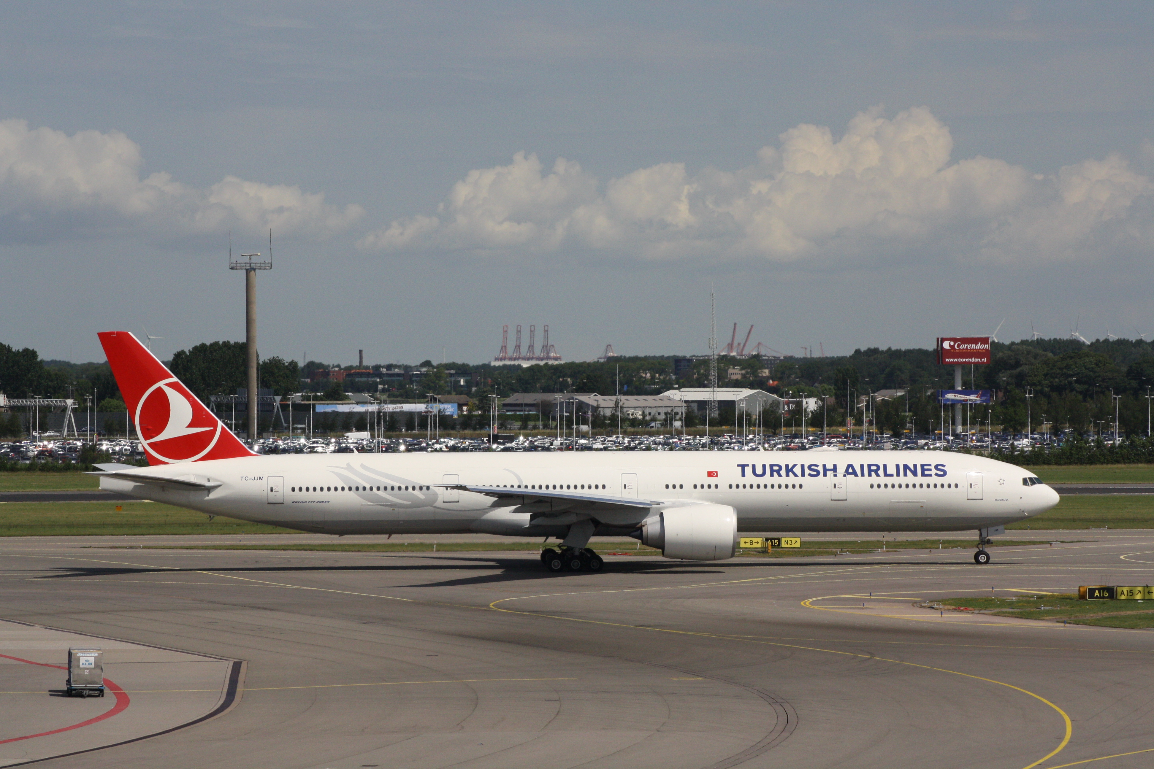 Turkish Airlines Boeing 777-300 in Nieuwe Kleuren